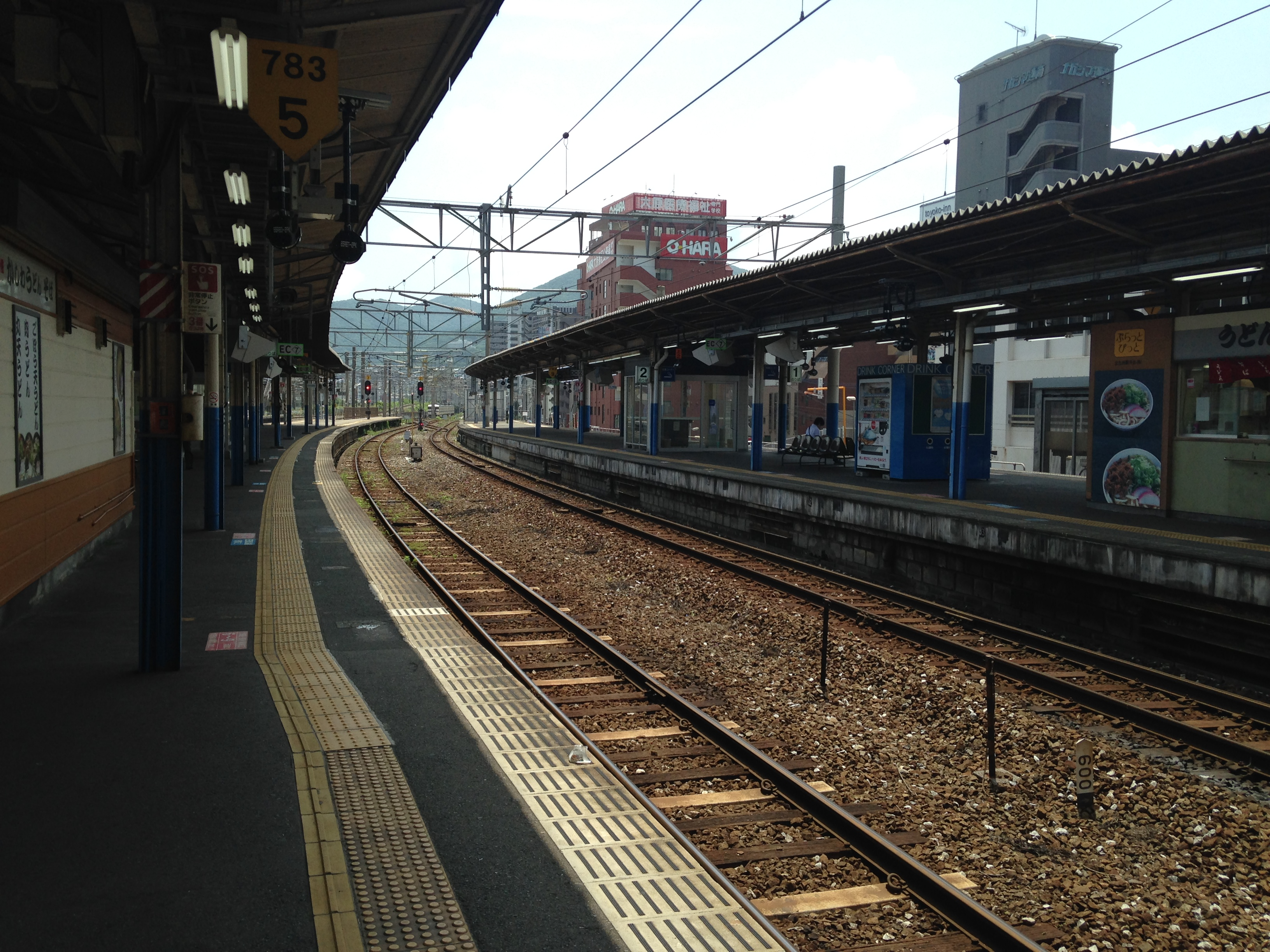 小倉駅ホームより望む鹿児島本線(門司方面)